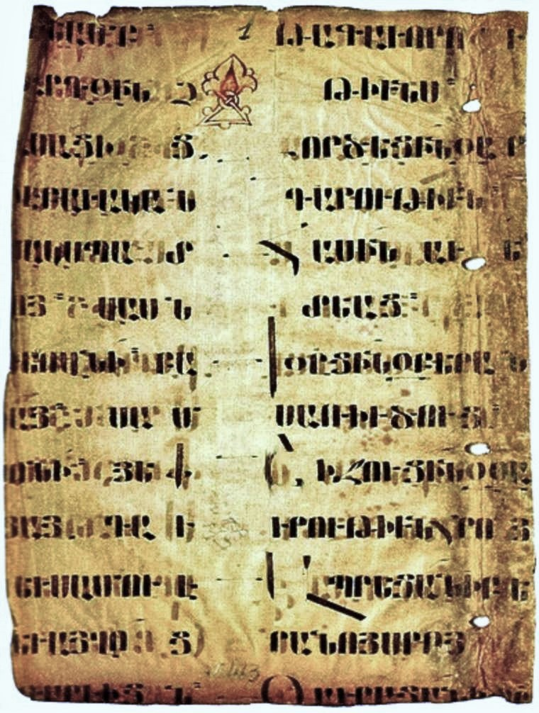 Fragment de l'Épître de Paul aux Hébreux, Matenadaran, patarik 463, f° 1.